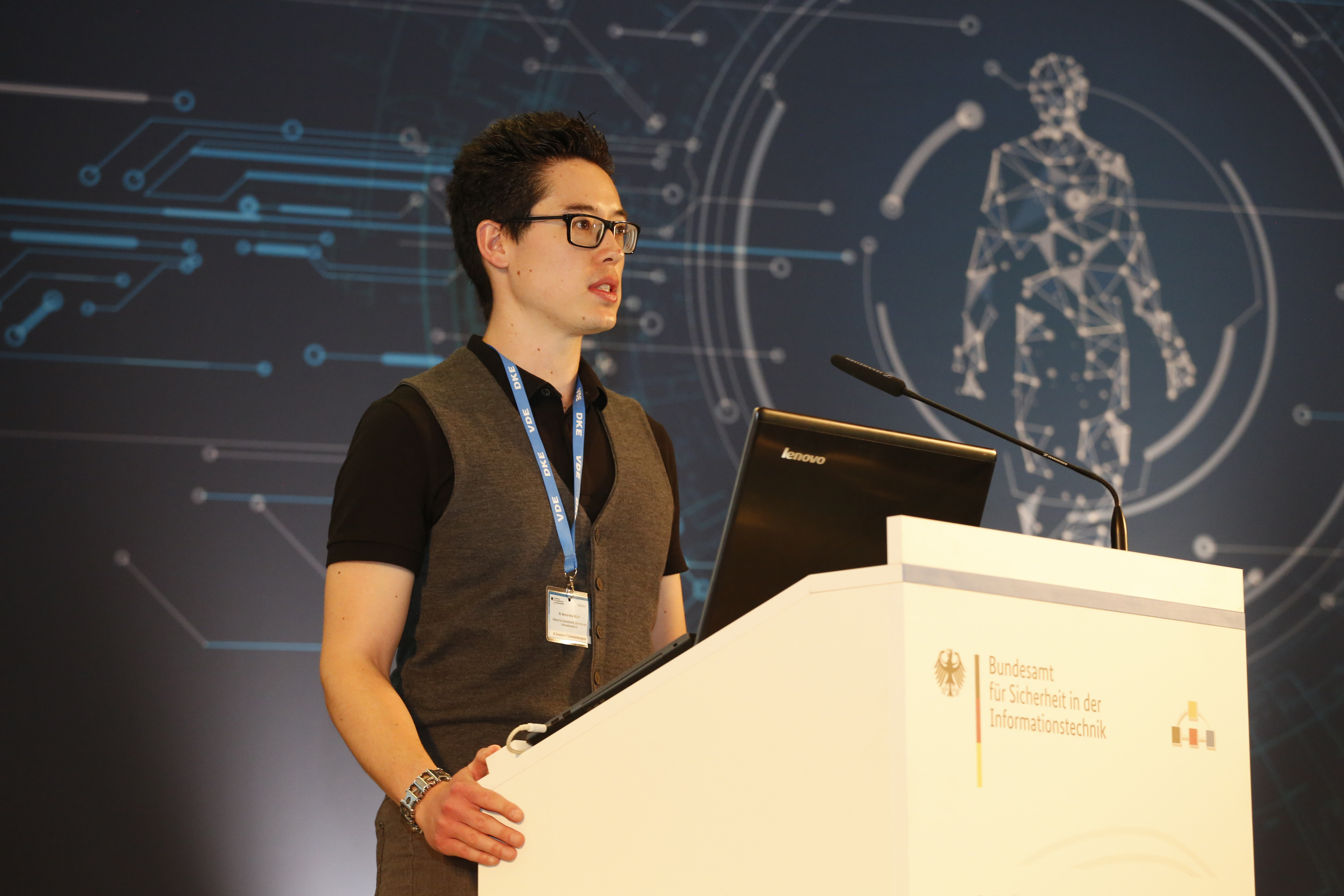 Dennis-Kenji Kipker, BSI-Kongress 2019 in Bonn